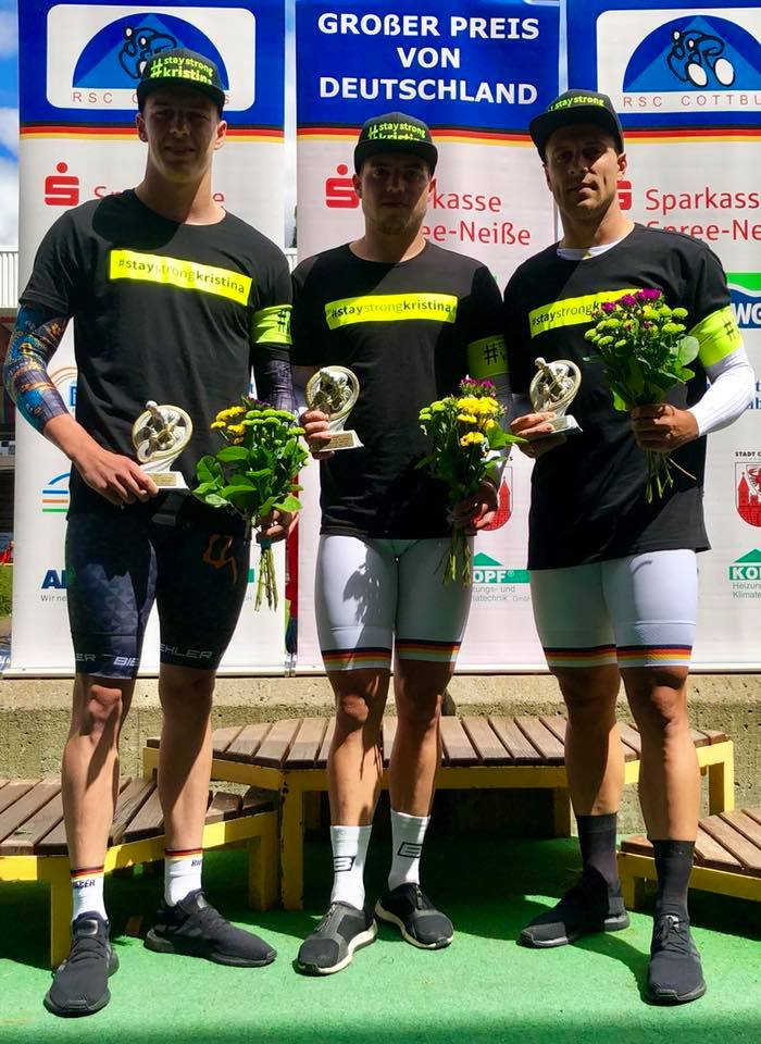 Sieger im Teamsprint (v.l.n.r.): Nik Schröter, Maximilian Dörnbach, Maximilian Levy, mit der Aufschrift #staystrongkristina